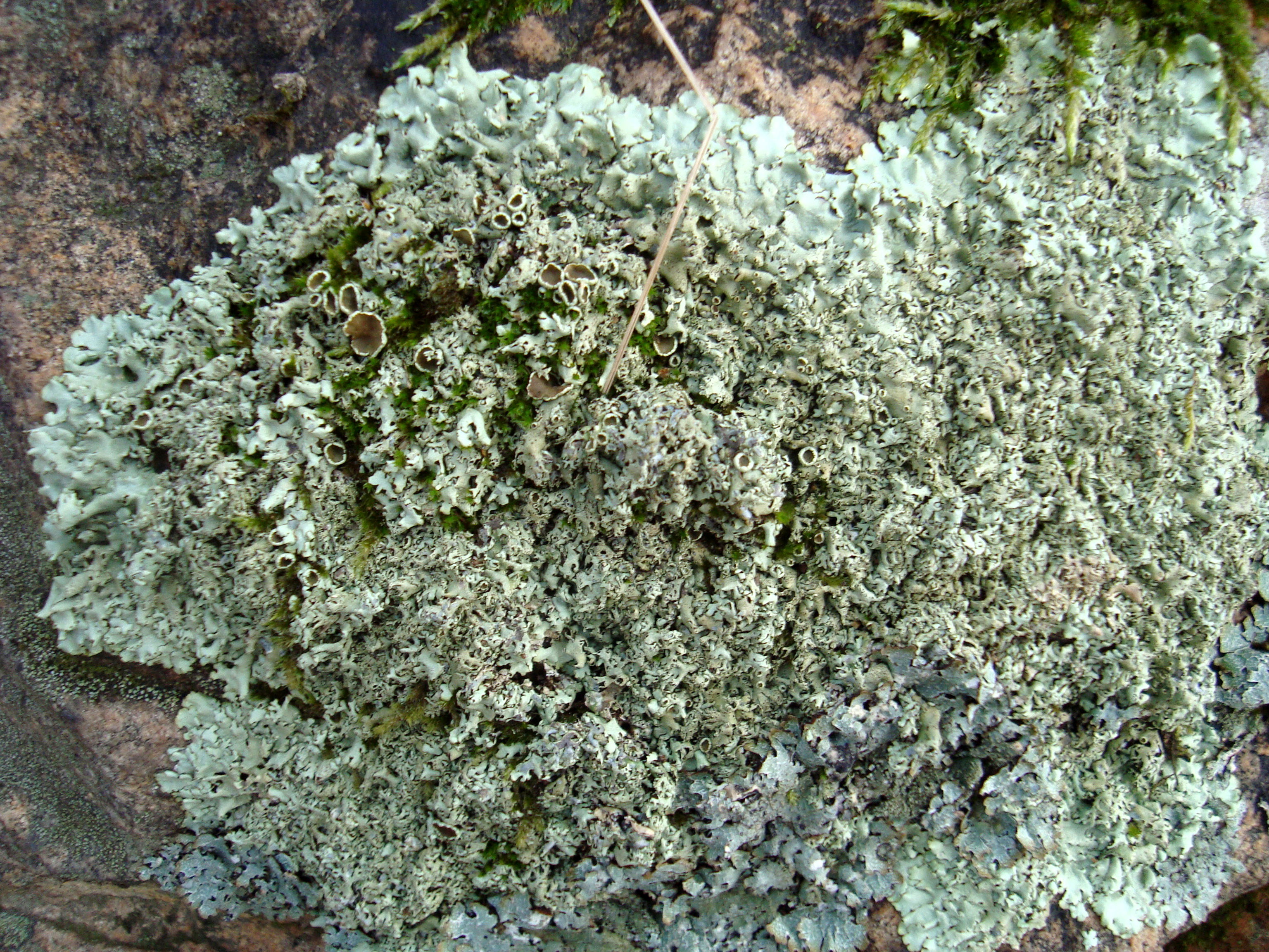 Lišejník - Xanthoparmelia stenophylla z Podkomorských lesů, Česká republika, jižní Morava